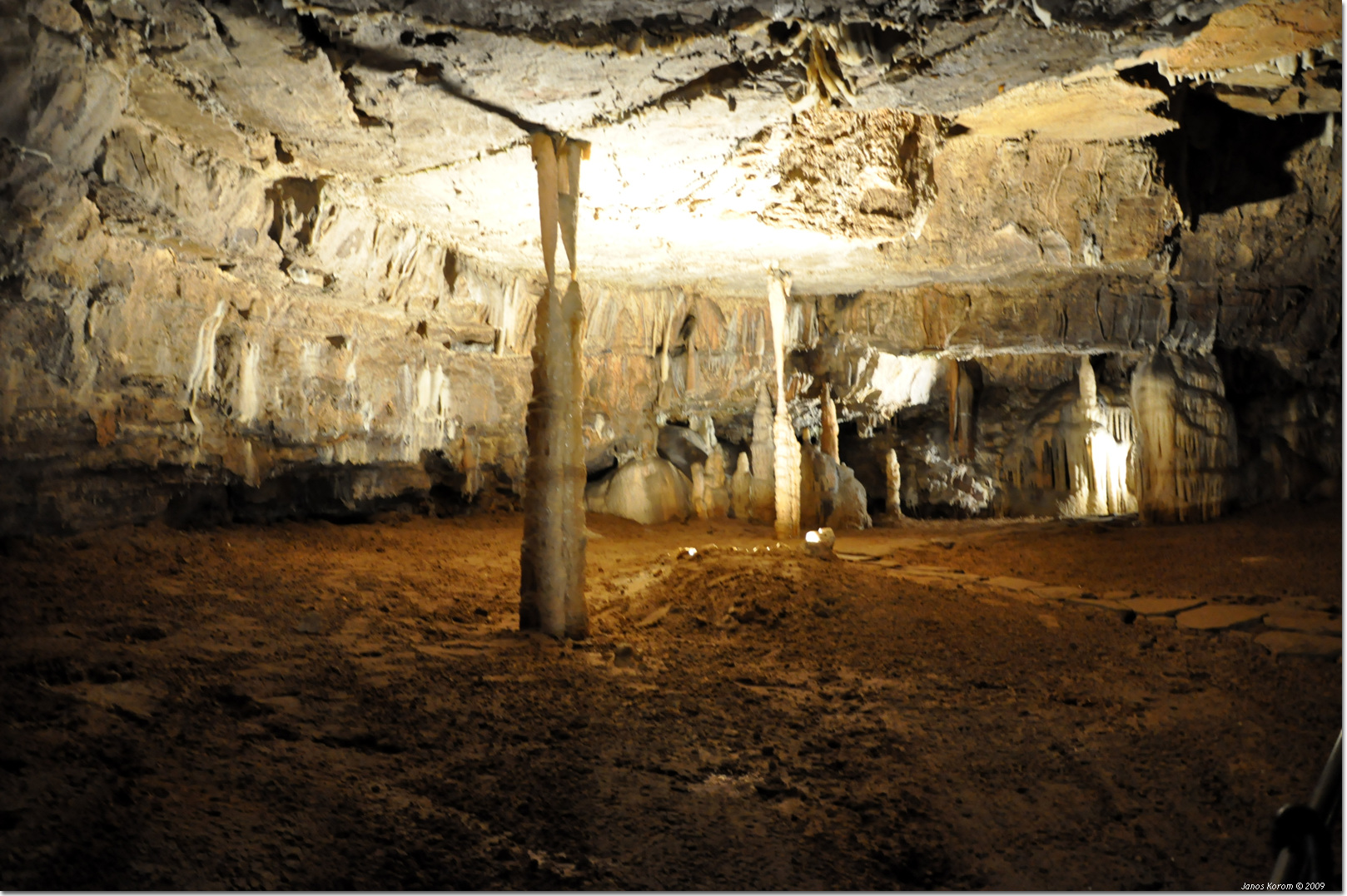 Postojna (68)